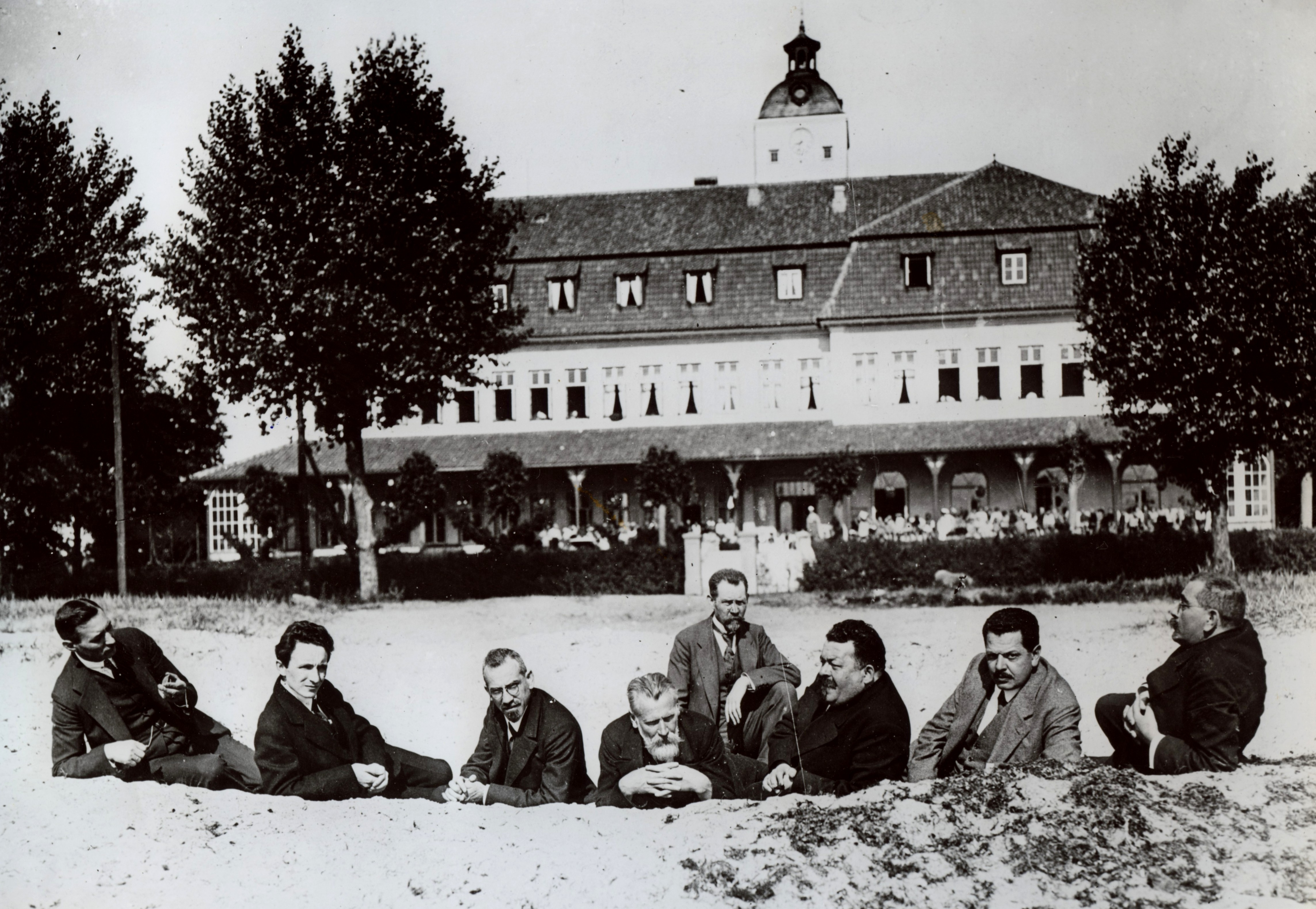 Hoher Besuch (mit Reichspräsident Ebert) im Gruppenbild vor dem Kinder-Erholungsheim "Produktion" in Haffkrug an der Ostsee im Juli 1919